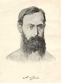 Disegno di Charlotte Ritter a partire da una fotografia di Robert Kaiser del 1887